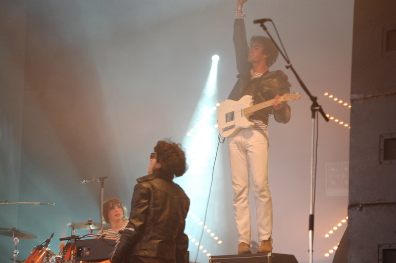 Naast en concert lors d'Art Rock 2007, Saint-Brieuc.